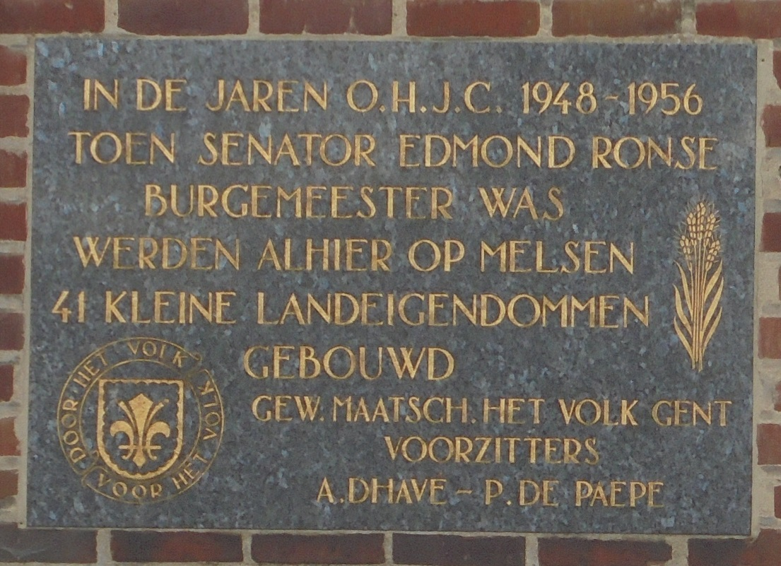 Gedenksteen bij de sociale woningen - meestal tweewoonsten - Kasteelstraat - Melsen - Merelbeke - Oost-Vlaanderen - België